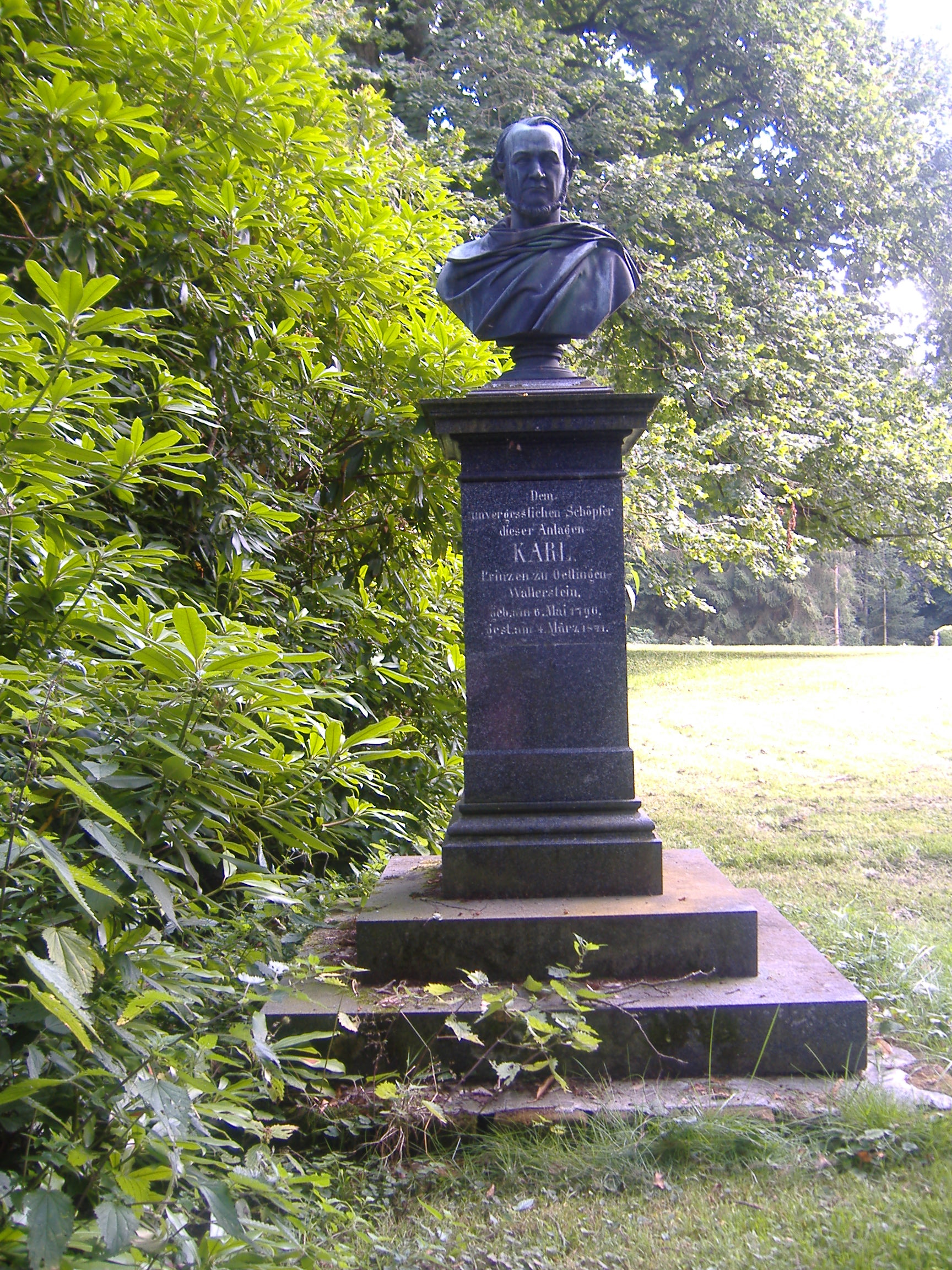 Denkmal des Parkgründers Schloss Seyfriedsberg